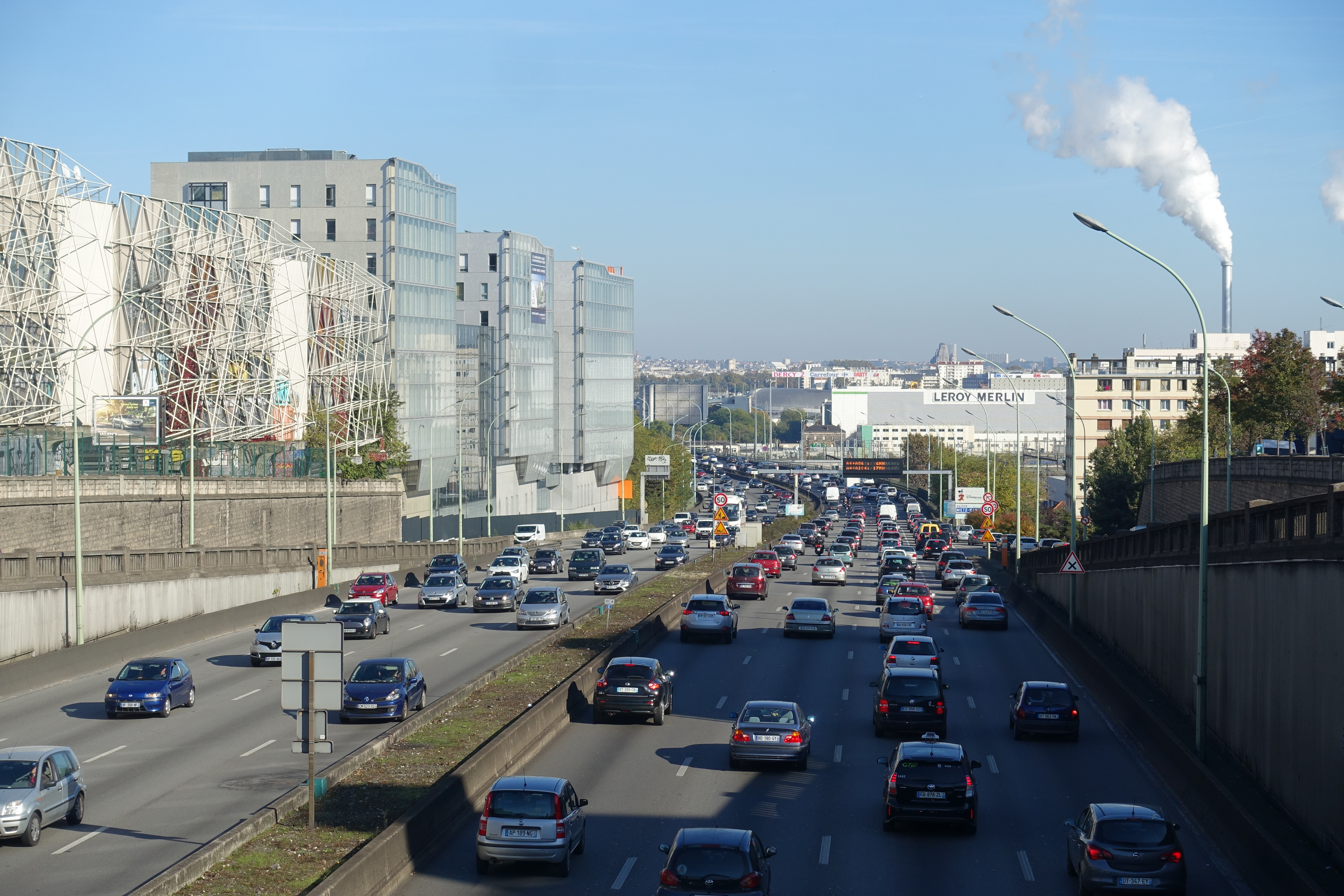 Périphérique @ Ivry-sur-Seine